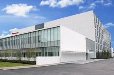 Штаб-квартира Pioneer в Нагасаки